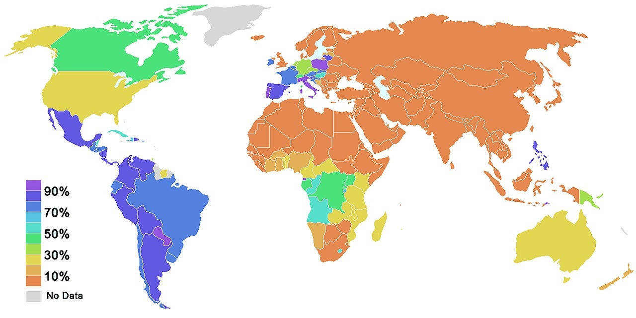 Mapa de la practica mundial del rito de la primera comunion